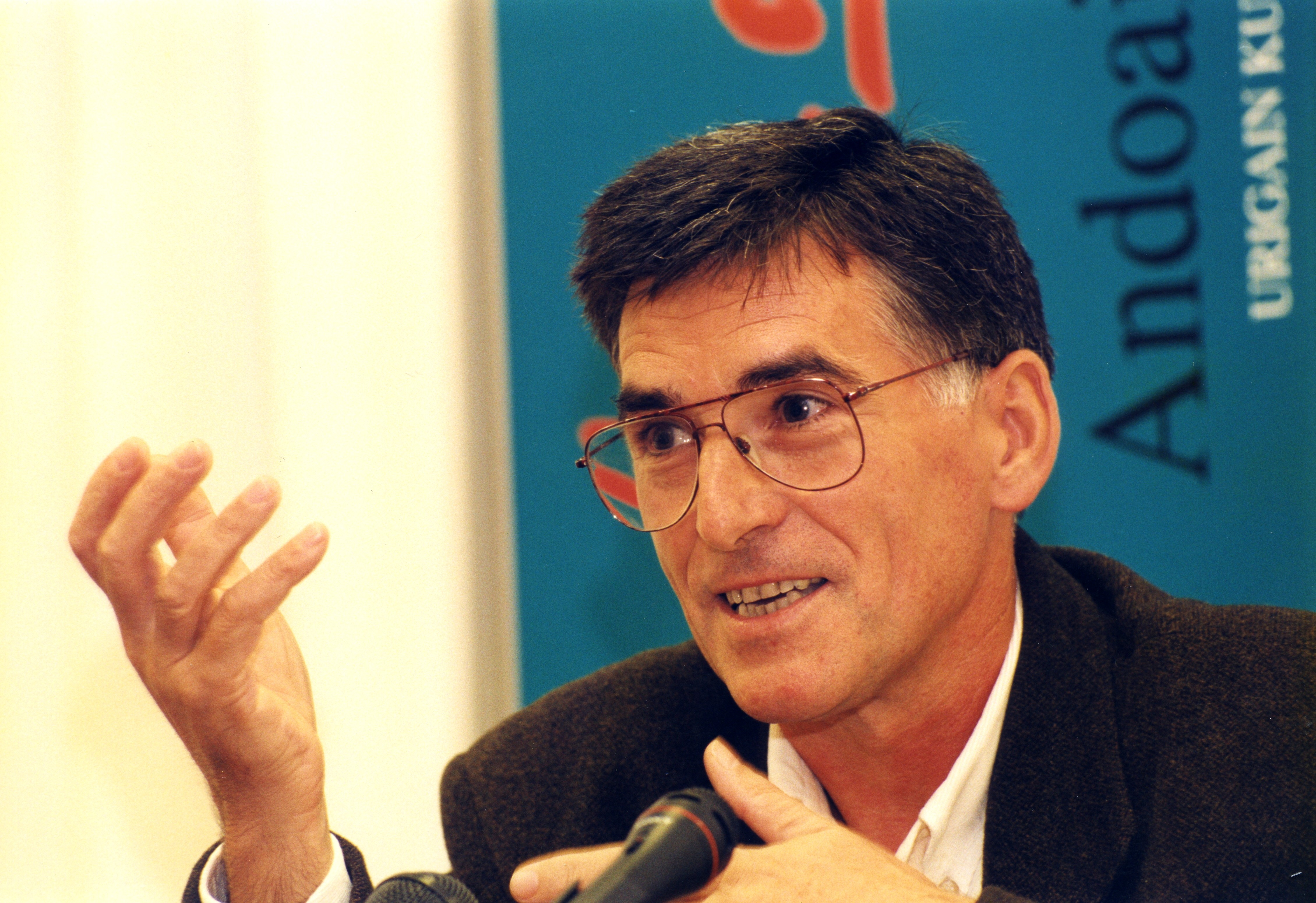 Aiurri 68 zbk. 17. orr.